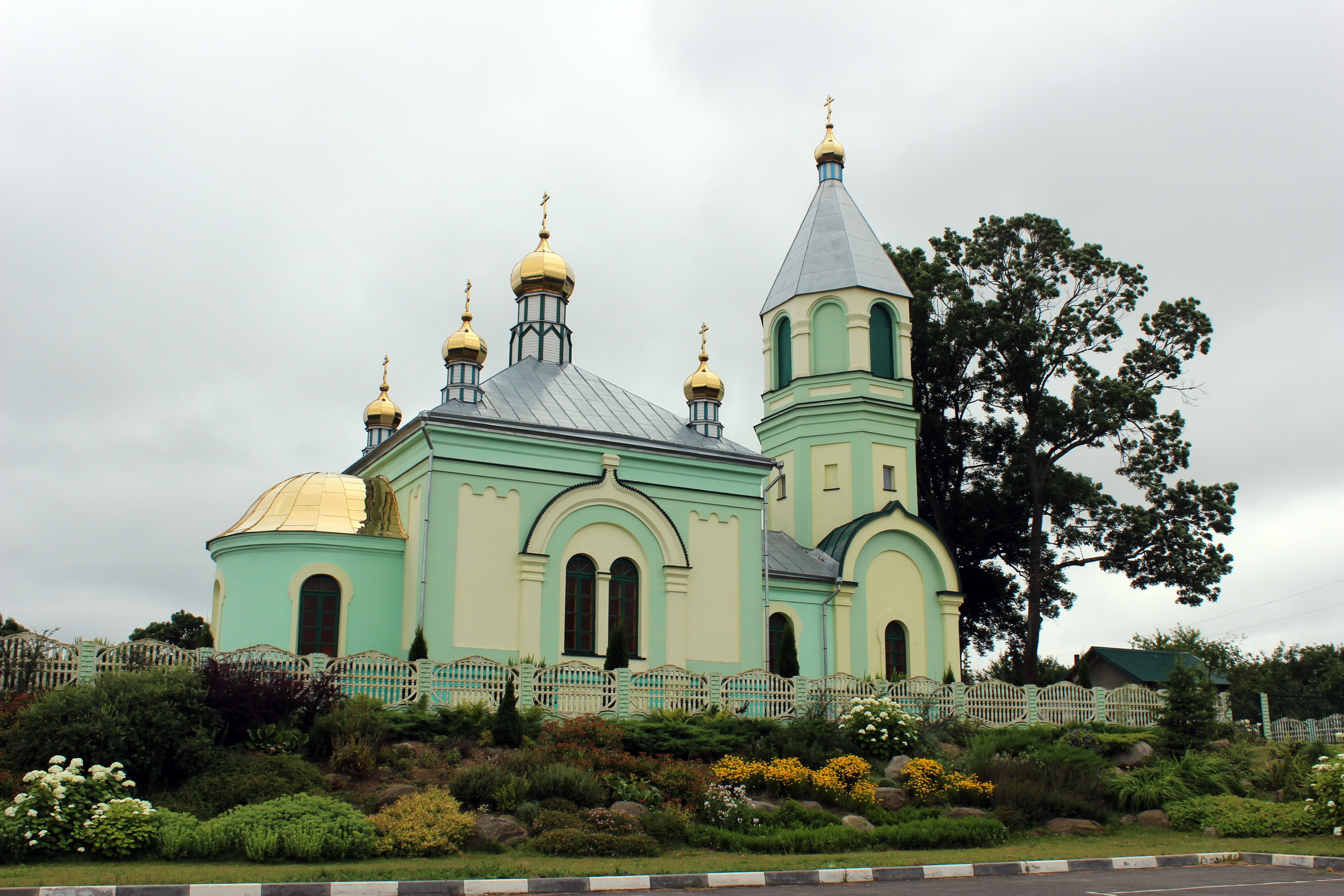 Царква Ушэсця Гасподняга ў Вельямовічах This is a photo of Belarusian heritage monument. Reference number: 113Г000074 ( WLM)